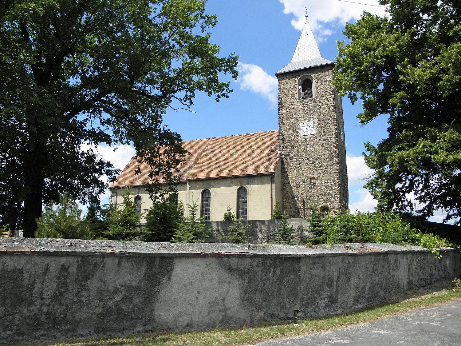 Lipinki Łużyckie - kościół parafialny św. Antoniego Padewskiego (zabytek nr rejestr. 346)